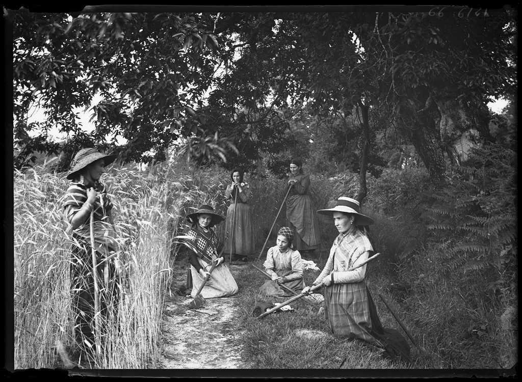 Reproduction numérique de l’œuvre Les Sarcleuses réalisée par Félix Arnaudin à Lüe Grué le 7 juin 1895 selon la technique du gélatino bromure d'argent sur plaque de verre (13 x 18 cm).